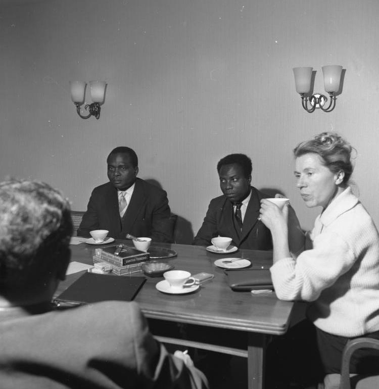 Generalsekretär für Information, Jean Bolikango und Armand Bobango, leitender Angestellter einer Bergwerksbehörde aus belg. Kongo (Vertreter der Front nationaler Einigung, kath. Partei) bei Besprechungen in der Geschäftsstelle der CDU Bonn.